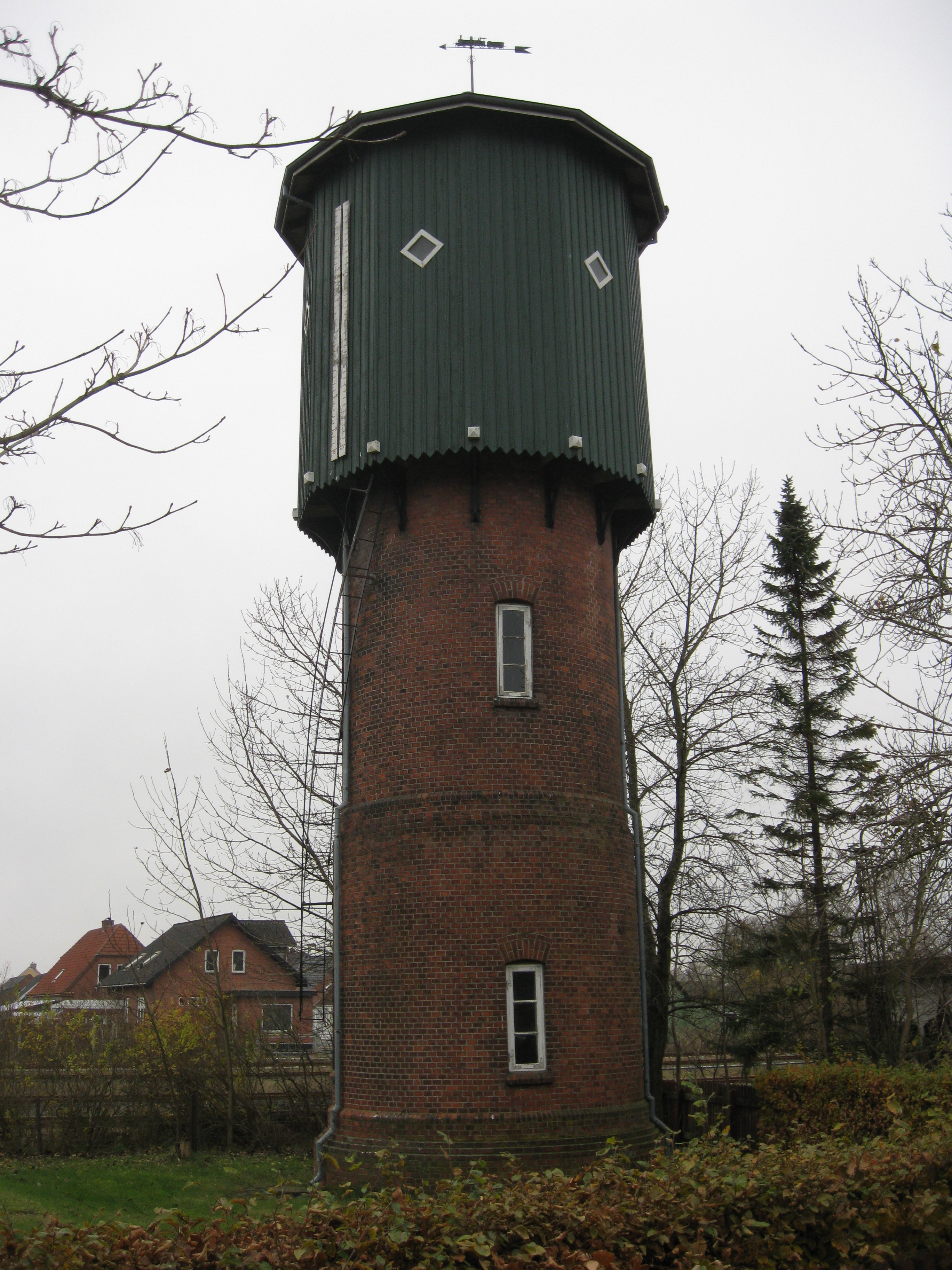 Det fredede vandtårn ved Skjern Station